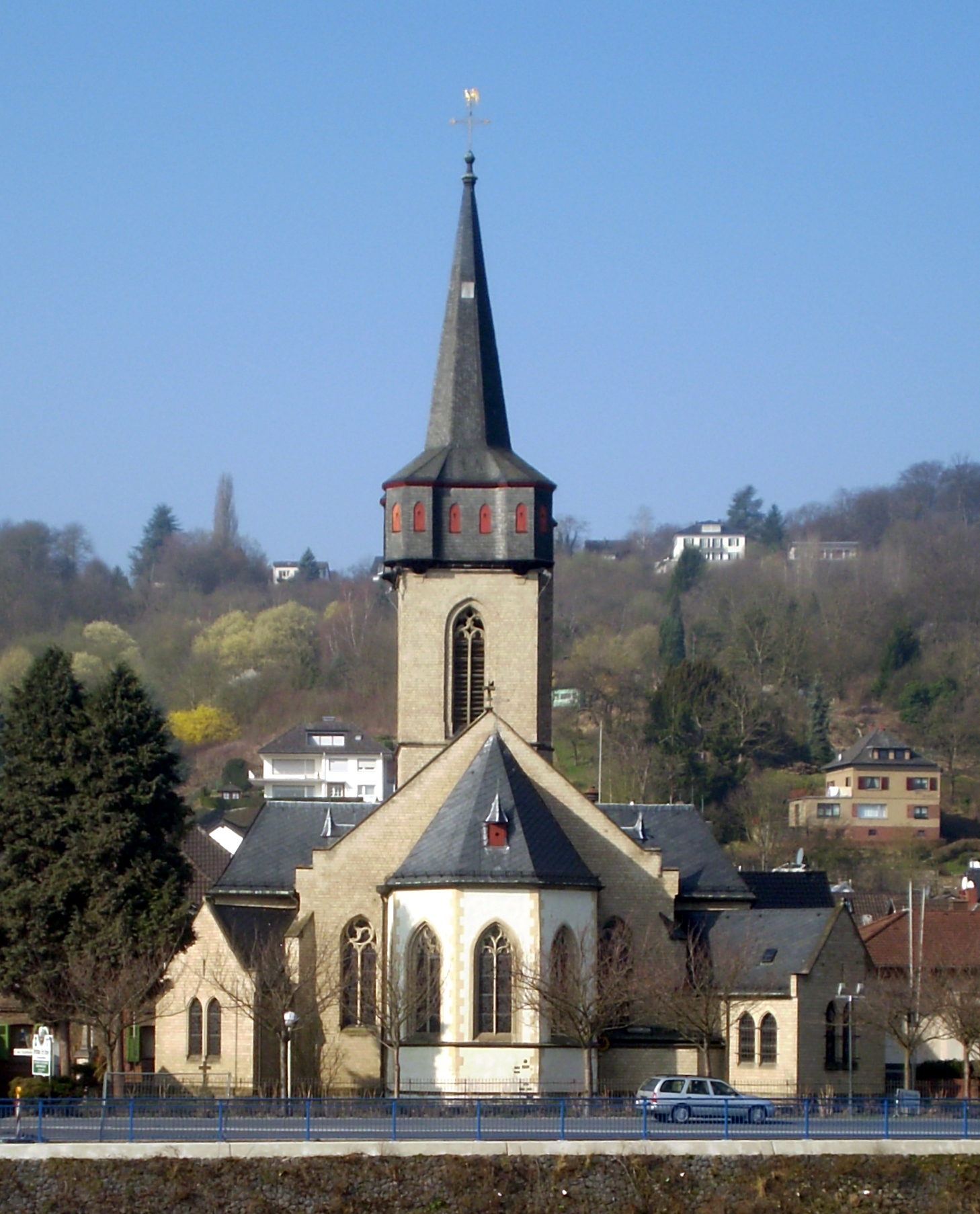 Katholische Pfarrkirche St. Laurentius, Oberwinter: Ansicht von der Landzunge des Hafens